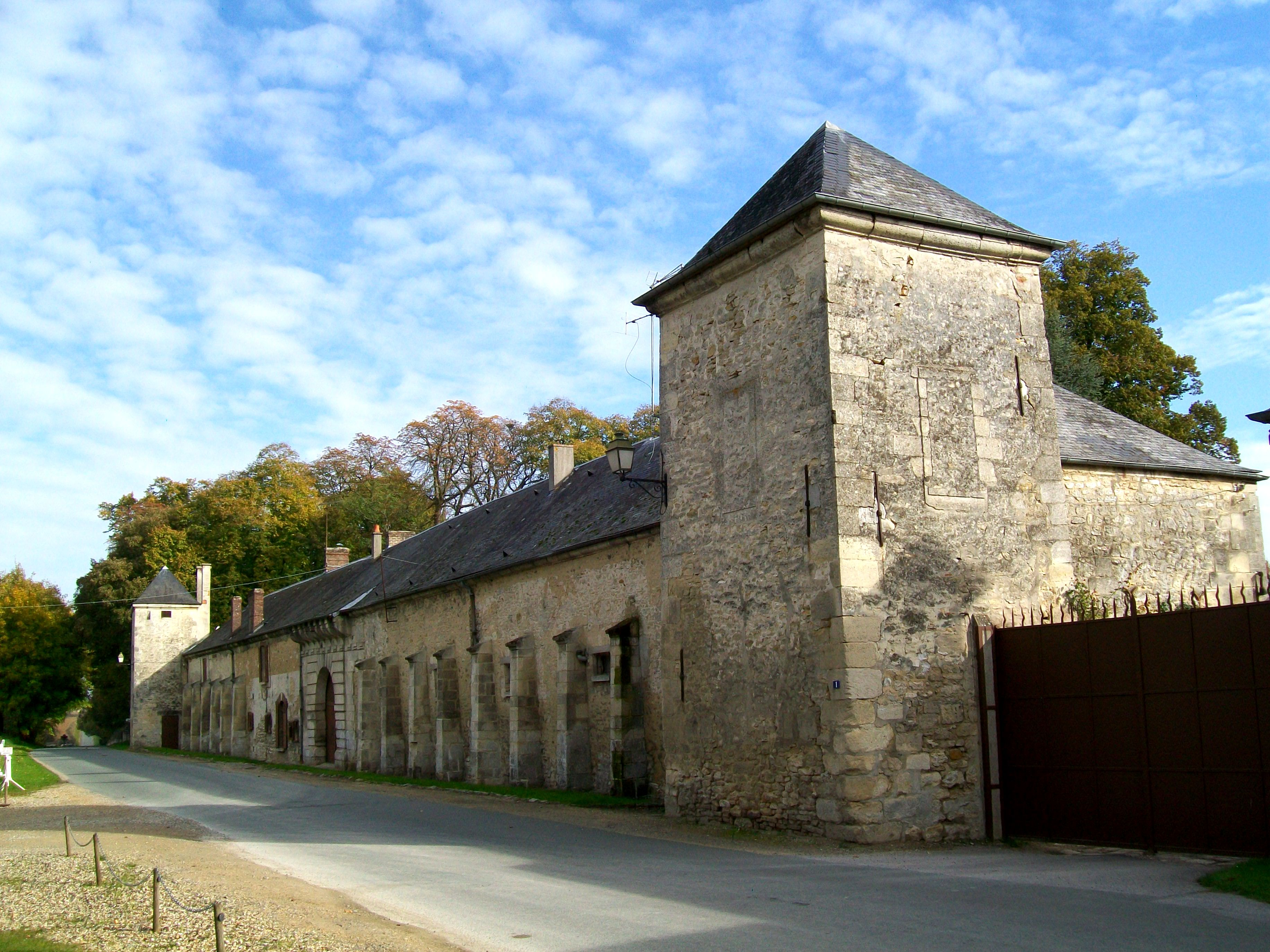 Vue d'ensemble des communs de l'ancien château, démoli pendant les années 1960 suite à un incendie.